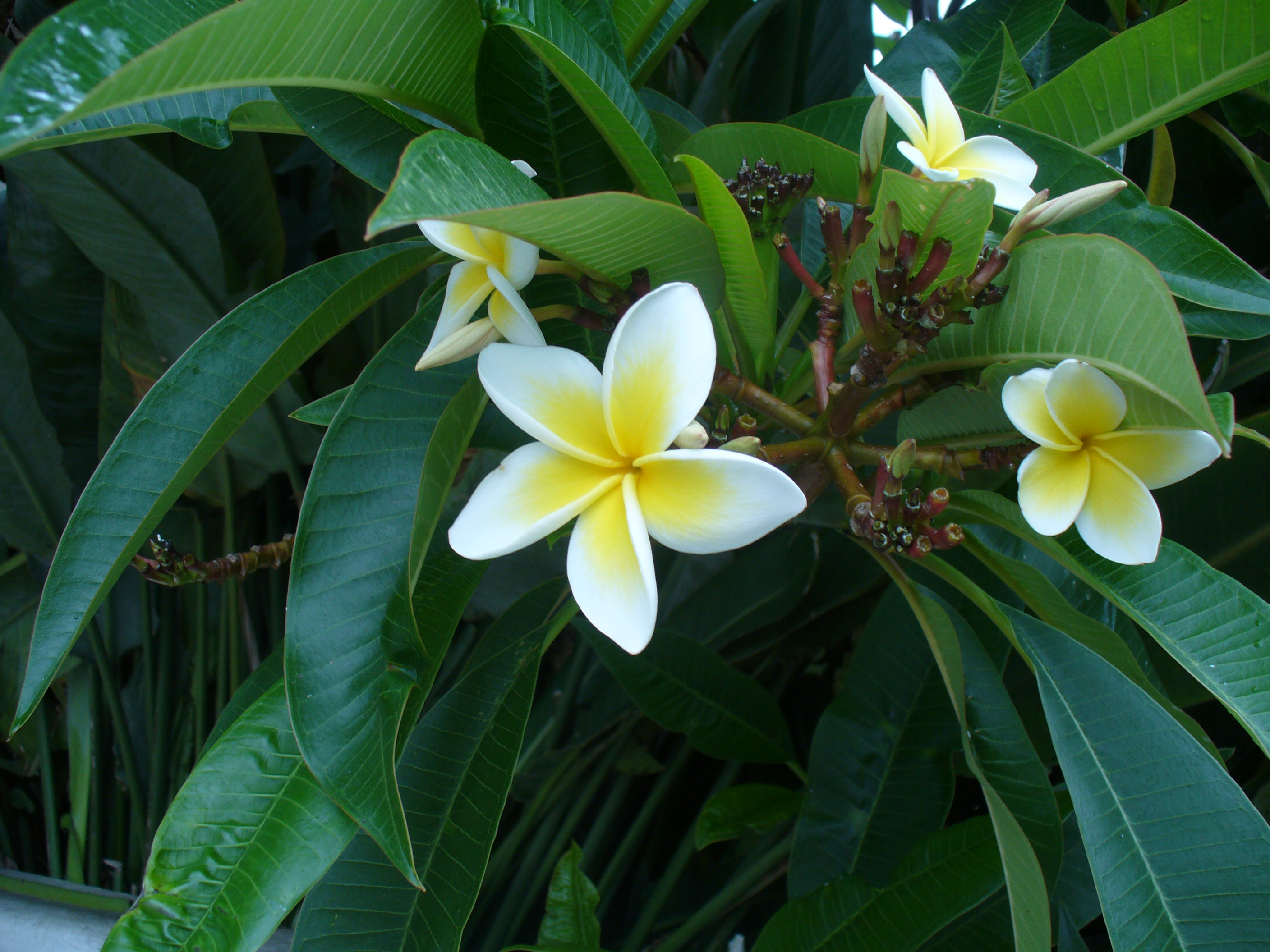 Plumeria rubra